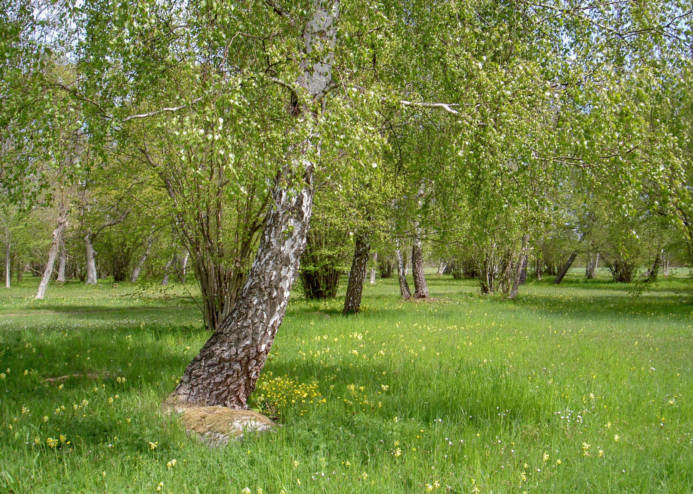 Lilla Horns löväng,Persnäs, Öland